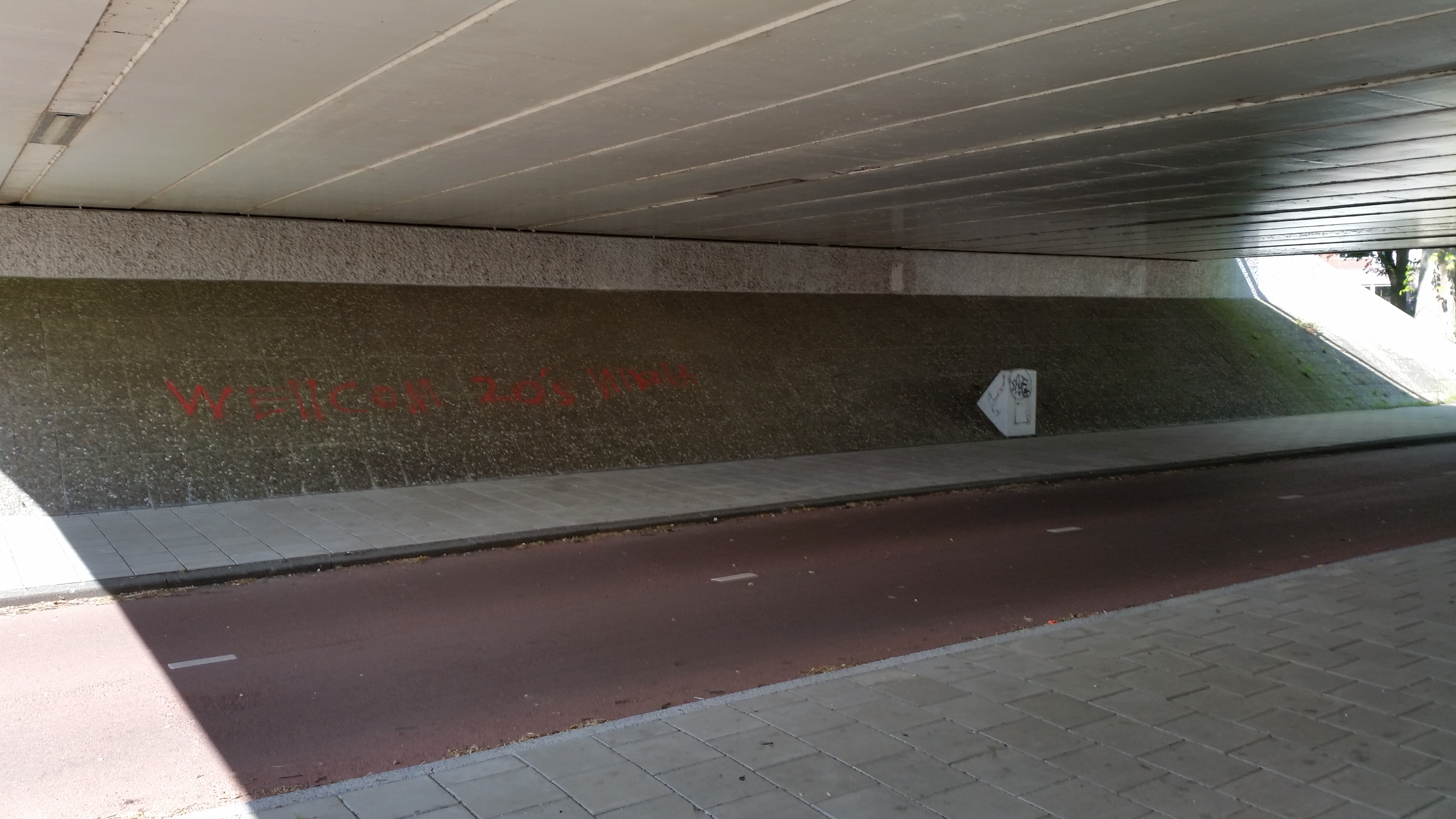 Op, om en onder der Frissensteinbrug (brug 1207) in Amsterdam-Zuidoost.